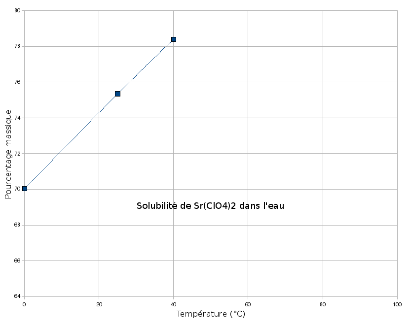 Solubilité de Sr(ClO4)2 dans l'eau en fonction de la température.